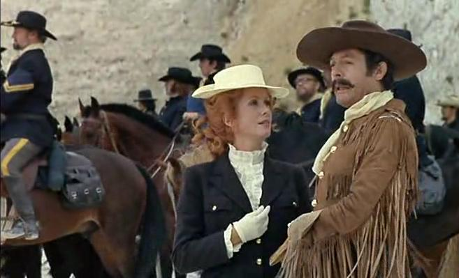 Marco Ferreri : Film Non toccare la donna bianca Mastroianni et Deneuve